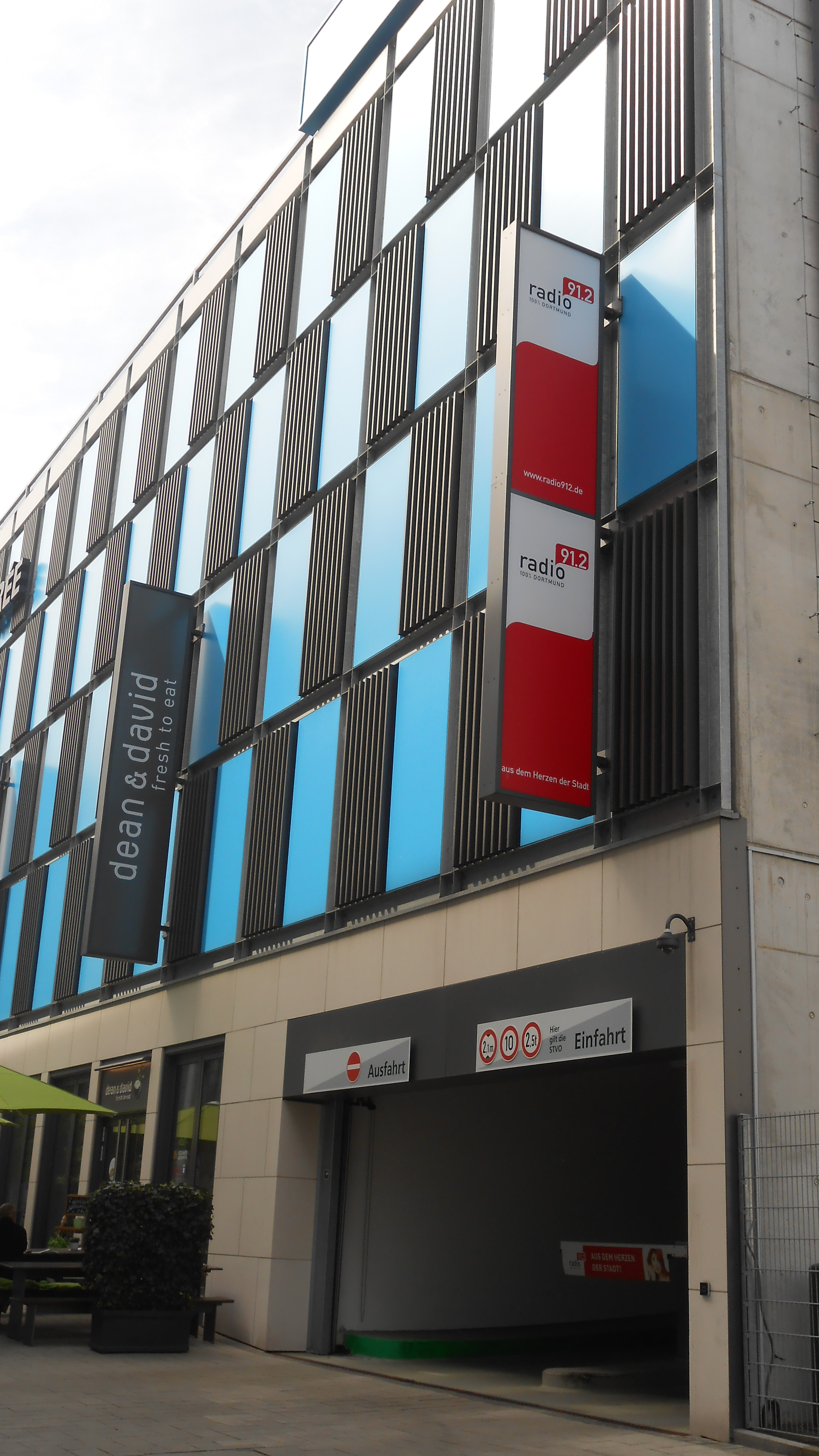 Das Lensing Carré, ein Büro- und Ladenkomplex in Nachbarschaft zum Einkaufszentrum Thiergalerie in der Dortmunder Innenstadt. Das Gebäude gehört dem Medienhaus Lensing, zu dem die Ruhr Nachrichten gehören. Diese ist zudem beteiligt am Lokalsender Radio 91.2, der ebenfalls hier seinen Sitz hat.